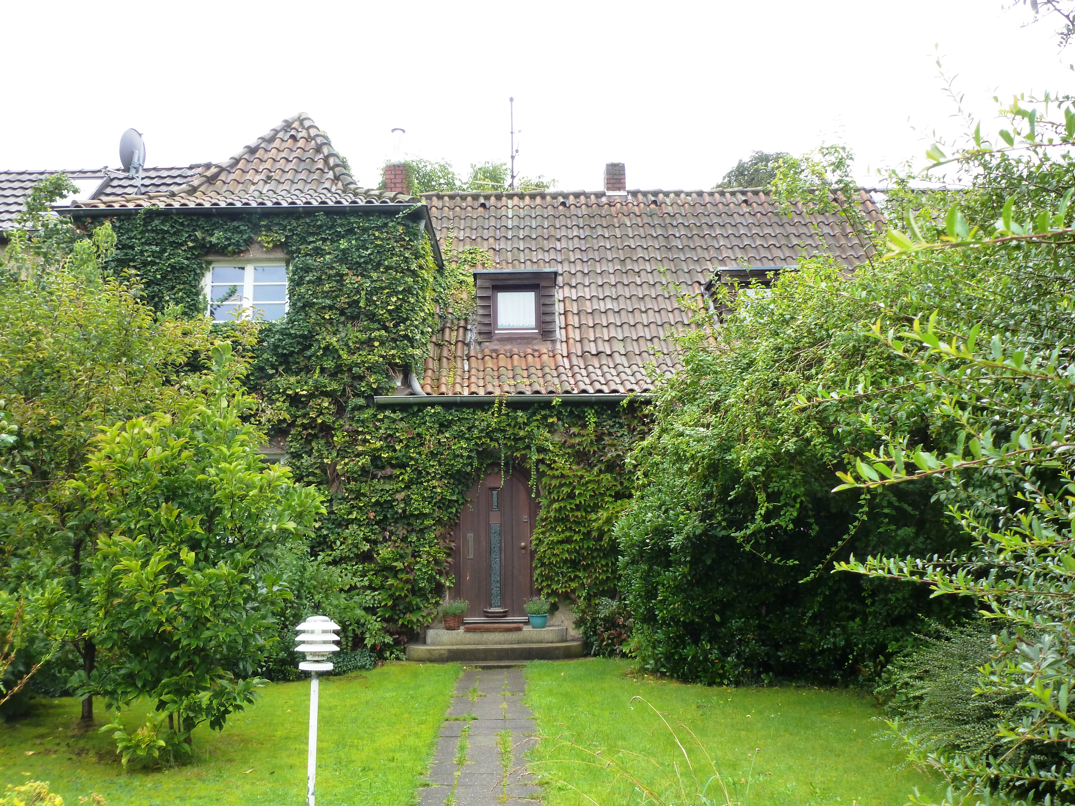 Haus Märchenstr. 45 in Köln-Dellbrück, Denkmal-Nr. 1787